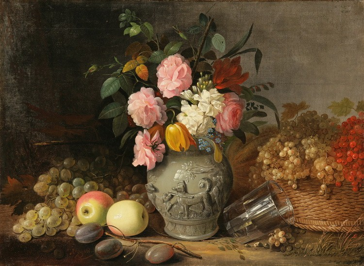 Беларуская (тарашкевіца): Ян (Іван) Хруцкі. Кветкі і фрукты